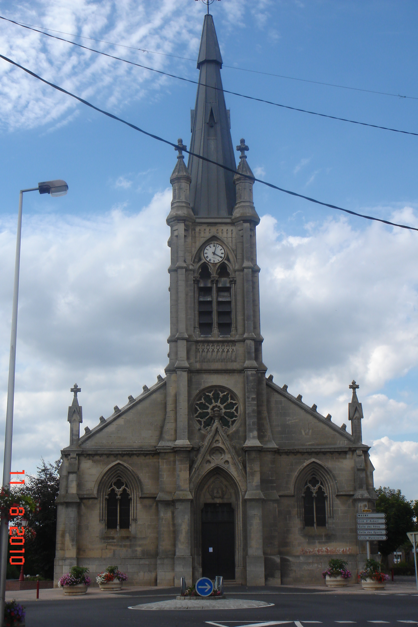 Église de Monchecourt